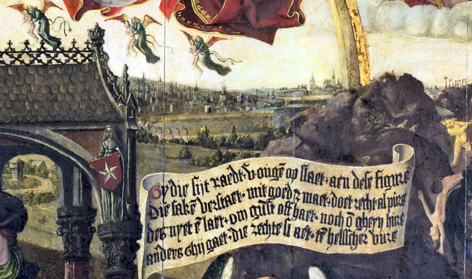 Detail van het Gerechtigheidspaneel of De dubbele gerechtigheid (Jan van Brussel, ca. 1475), voorheen in het Stadhuis van Maastricht, sinds 2018 in het Bonnefantenmuseum. Hier het rechter middendeel met een tekstbanier waarin de rechters opgeroepen eerlijk recht te spreken. Op de achtergrond een vroeg stadsgezicht van Maastricht.